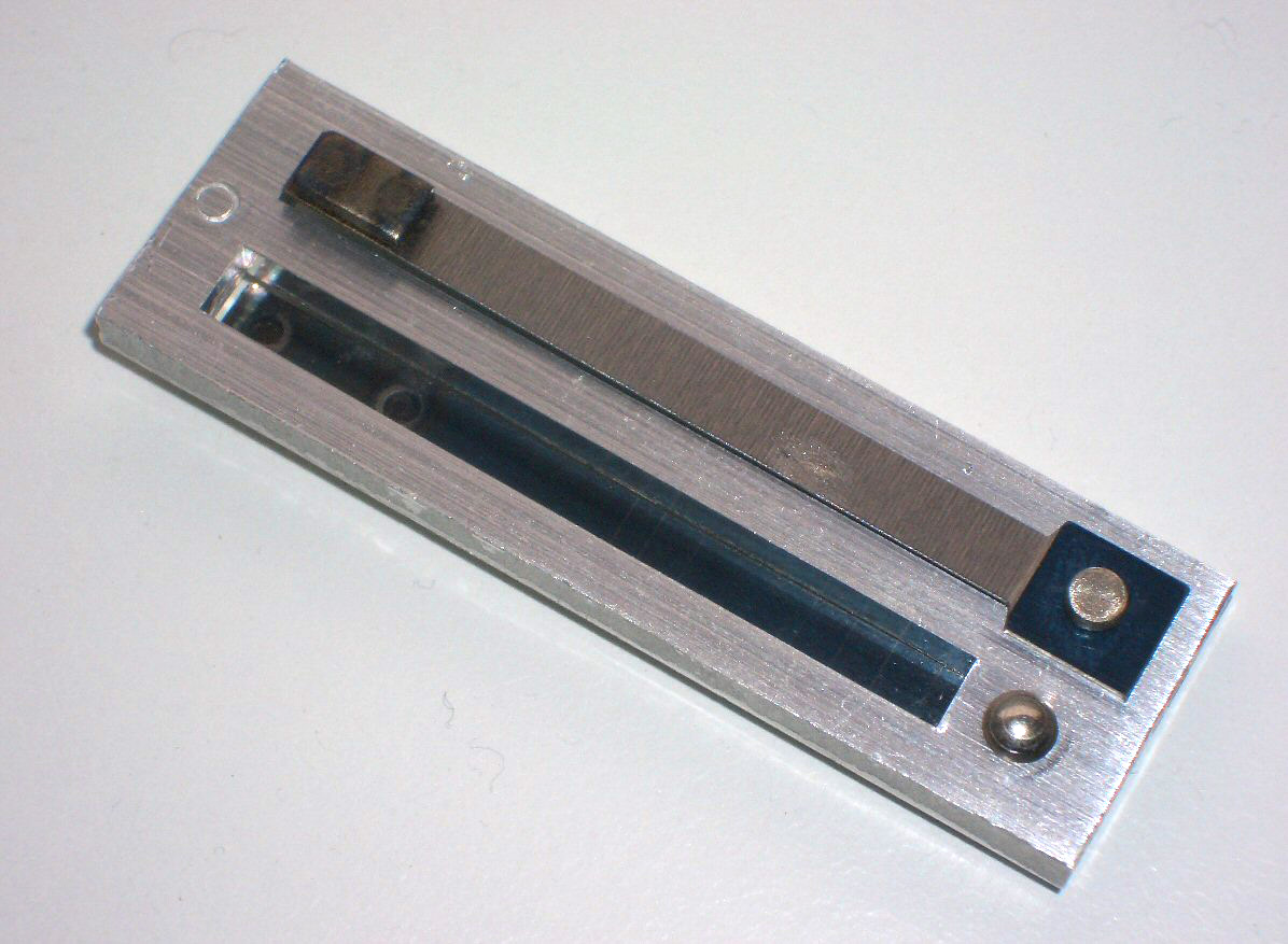 DIX Bassstimplatte eines Akkordeons